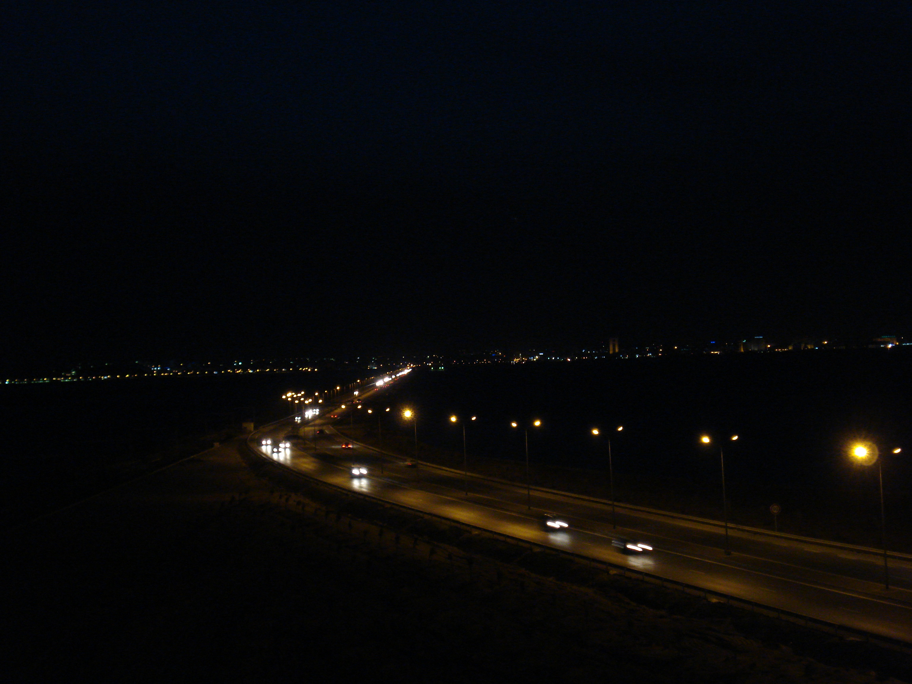 Voie rapide Tunis-Le Kram comme photographiée de nuit depuis le pont Radès-La Goulette, Tunisie